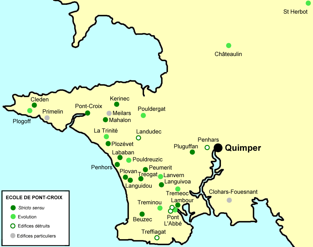 Carte de répartition des édifices témoignant, à des degrés divers, du style ou de l'influence de l'Ecole de Pont-Croix